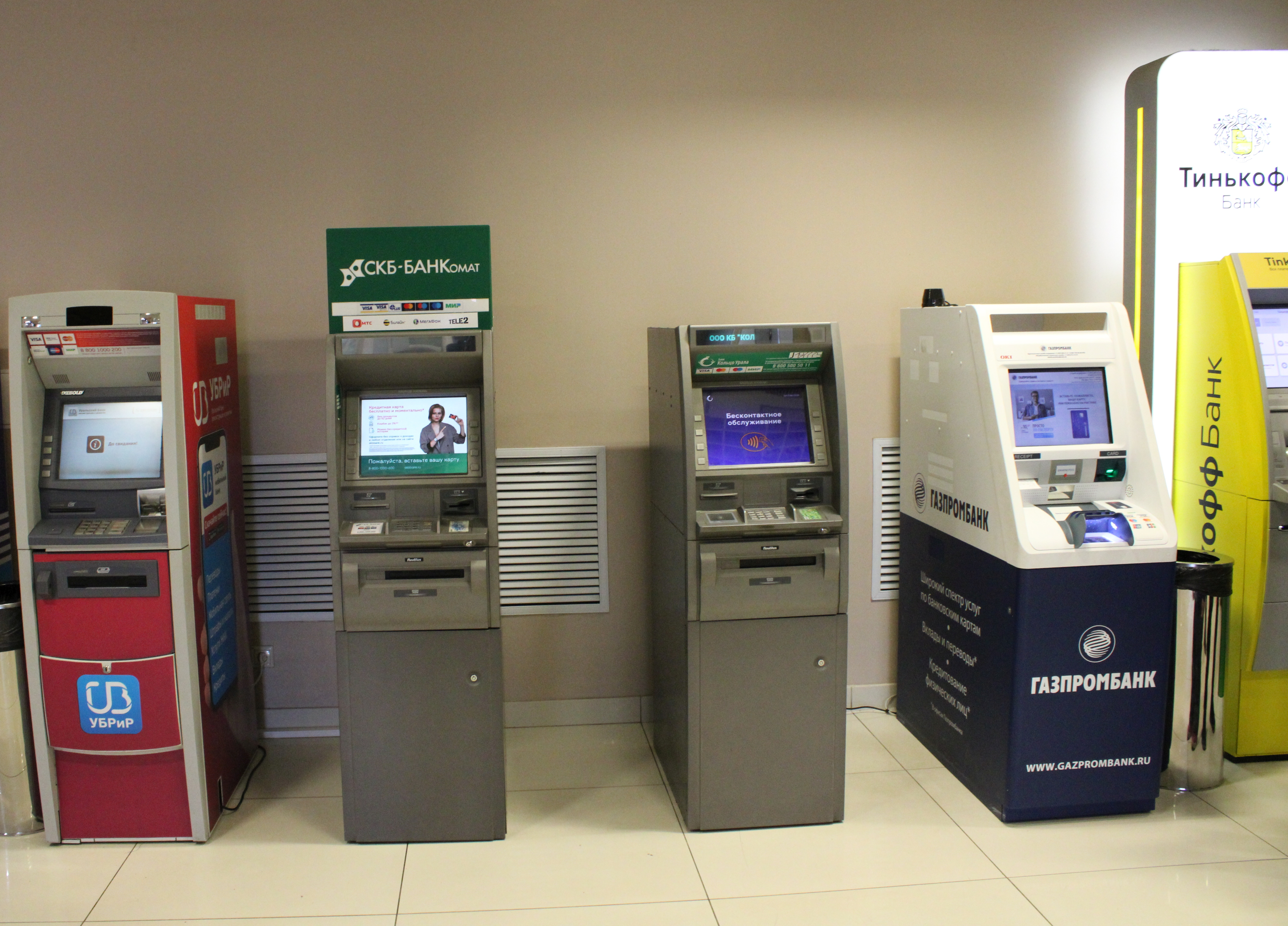 Банкоматы в торгово-развлекательном комплексе (ТРК) «Глобус» (Екатеринбург, улица Щербакова, 4)